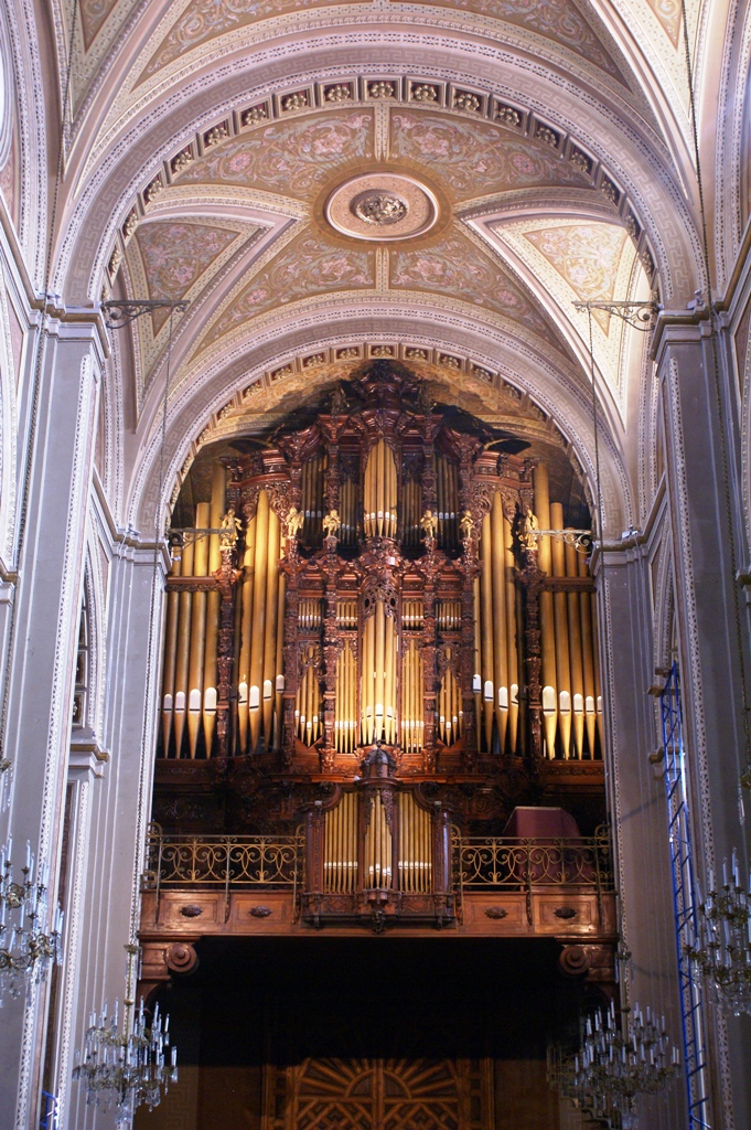 Órgano tubular ubicado en la Catedral de Morelia, Michoacán, México. Fabricado en Alemania en 1905, consta de 4600 flautas.